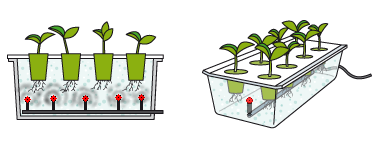 Система выращивания растений на аэропонике